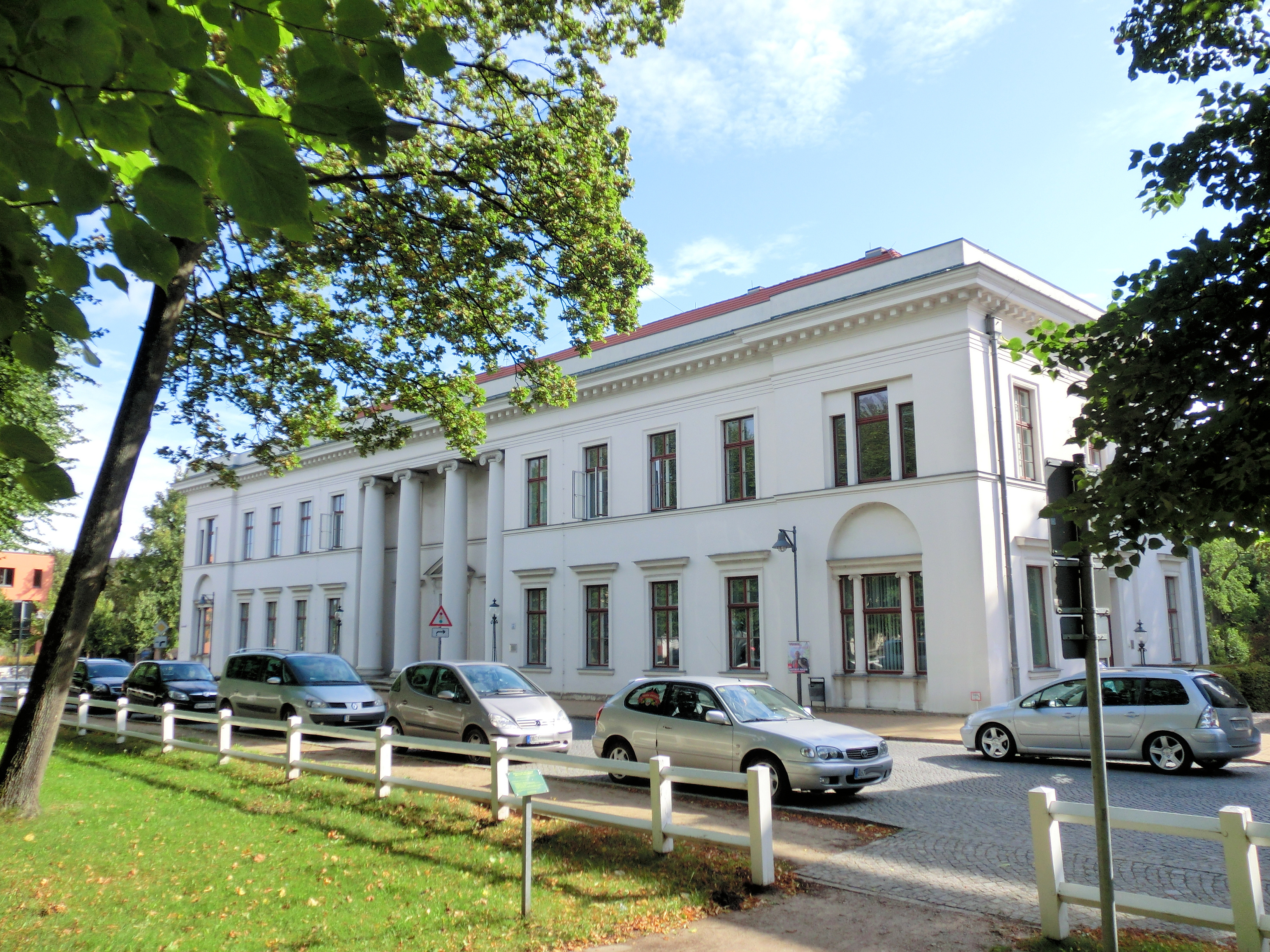 Bad Doberan, August-Bebel-Strasse 4, Palaisgebäude, Baudenkmal